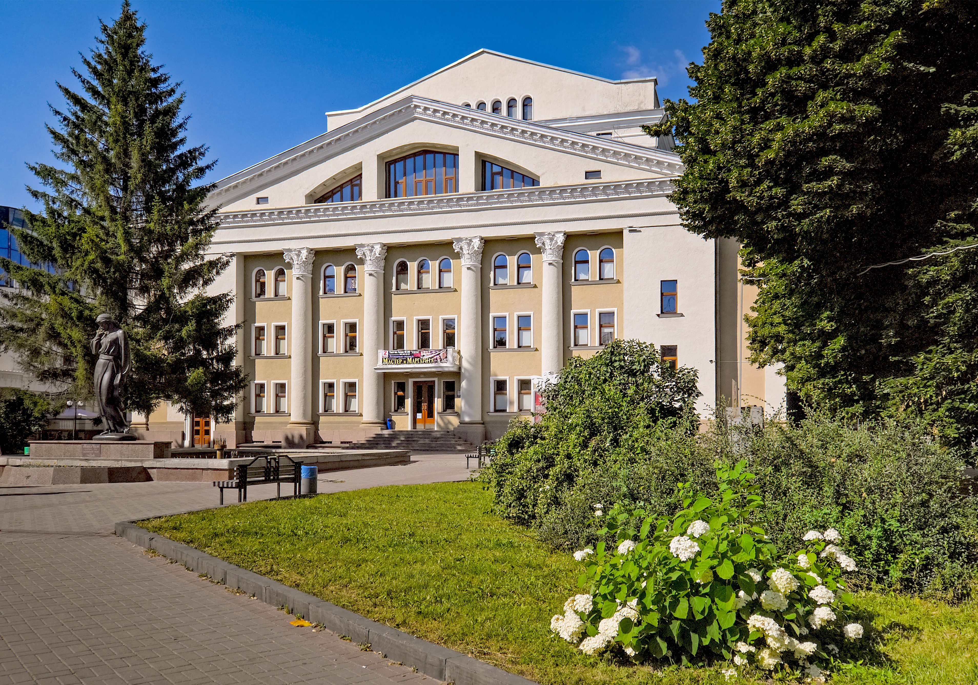 Полтавський академічний обласний український музично-драматичний театр імені Миколи Гоголя, Полтава, вул. Соборності (Жовтнева), 23